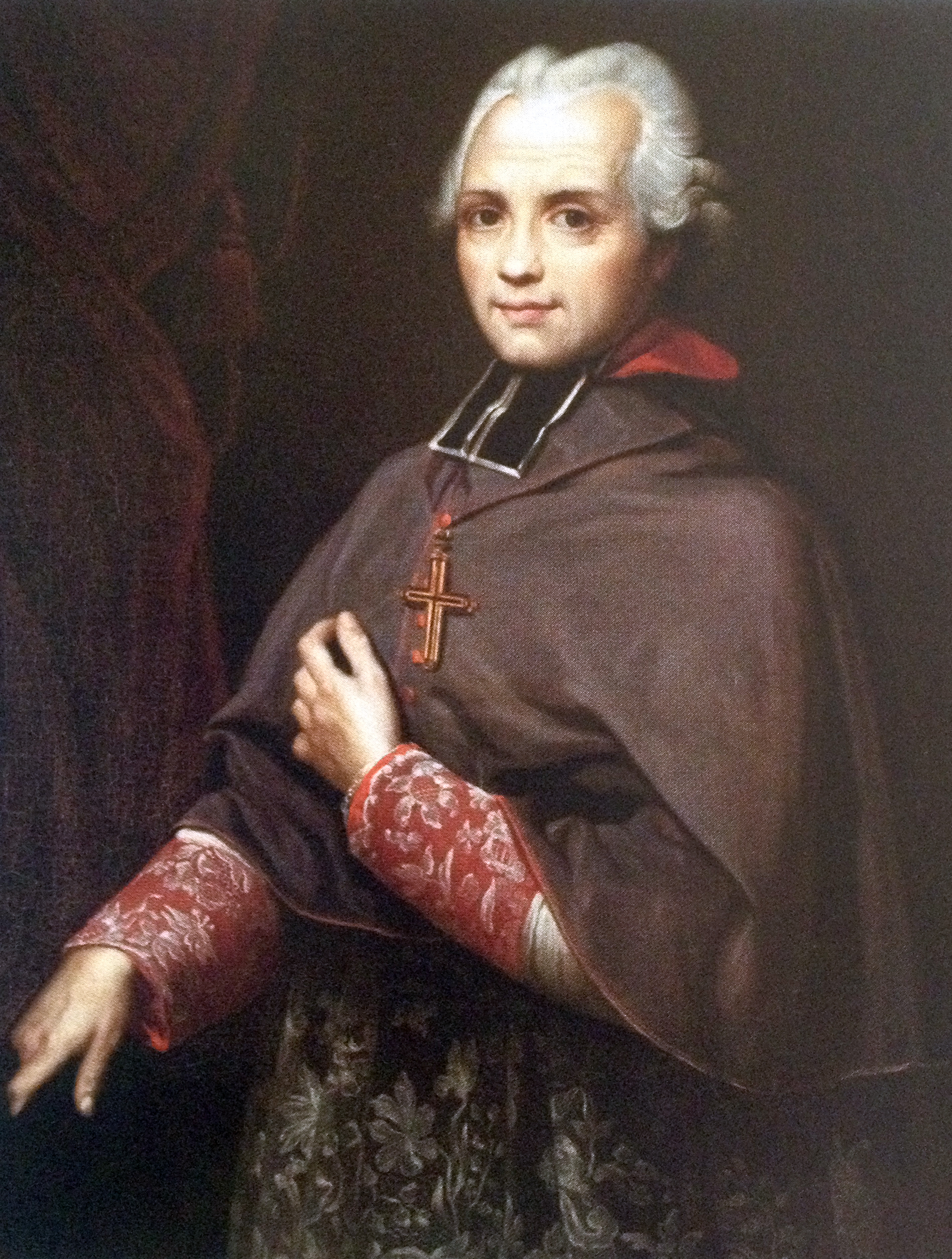 Portrait de monseigneur François de Pierre de Bernis, archevêque de Rouen (1819-1823).